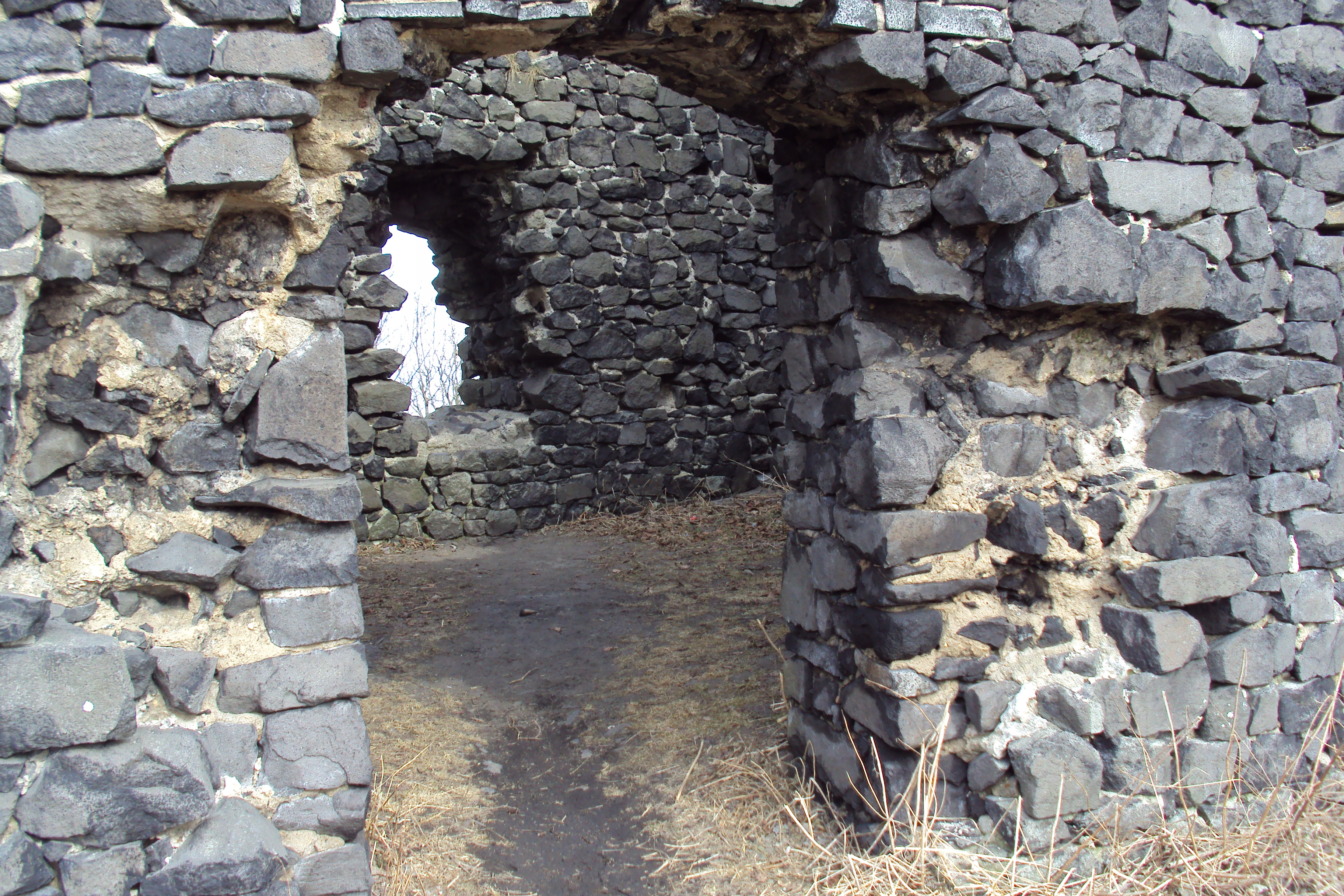 Zřícenina hradu Ronov na Českolipsku